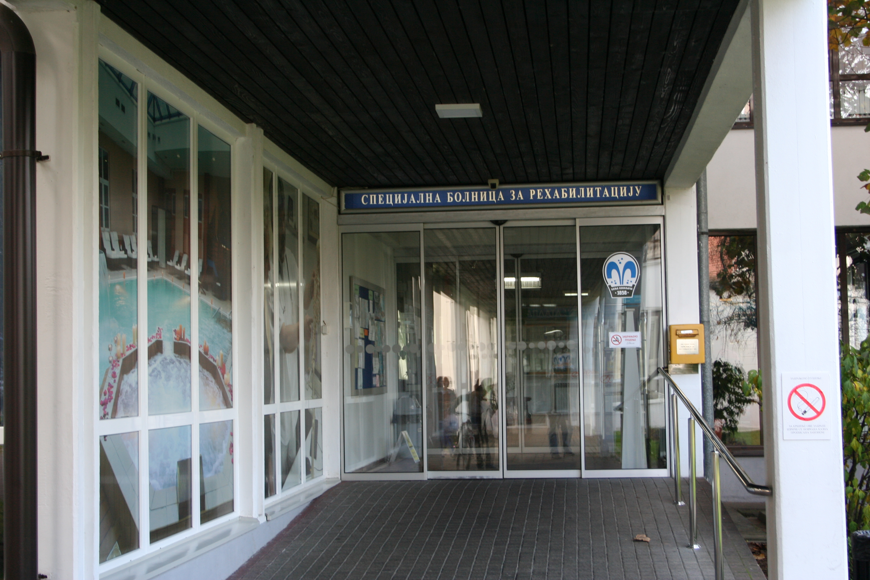 Specijalna bolnica za rehabilitaciju Banja Koviljača